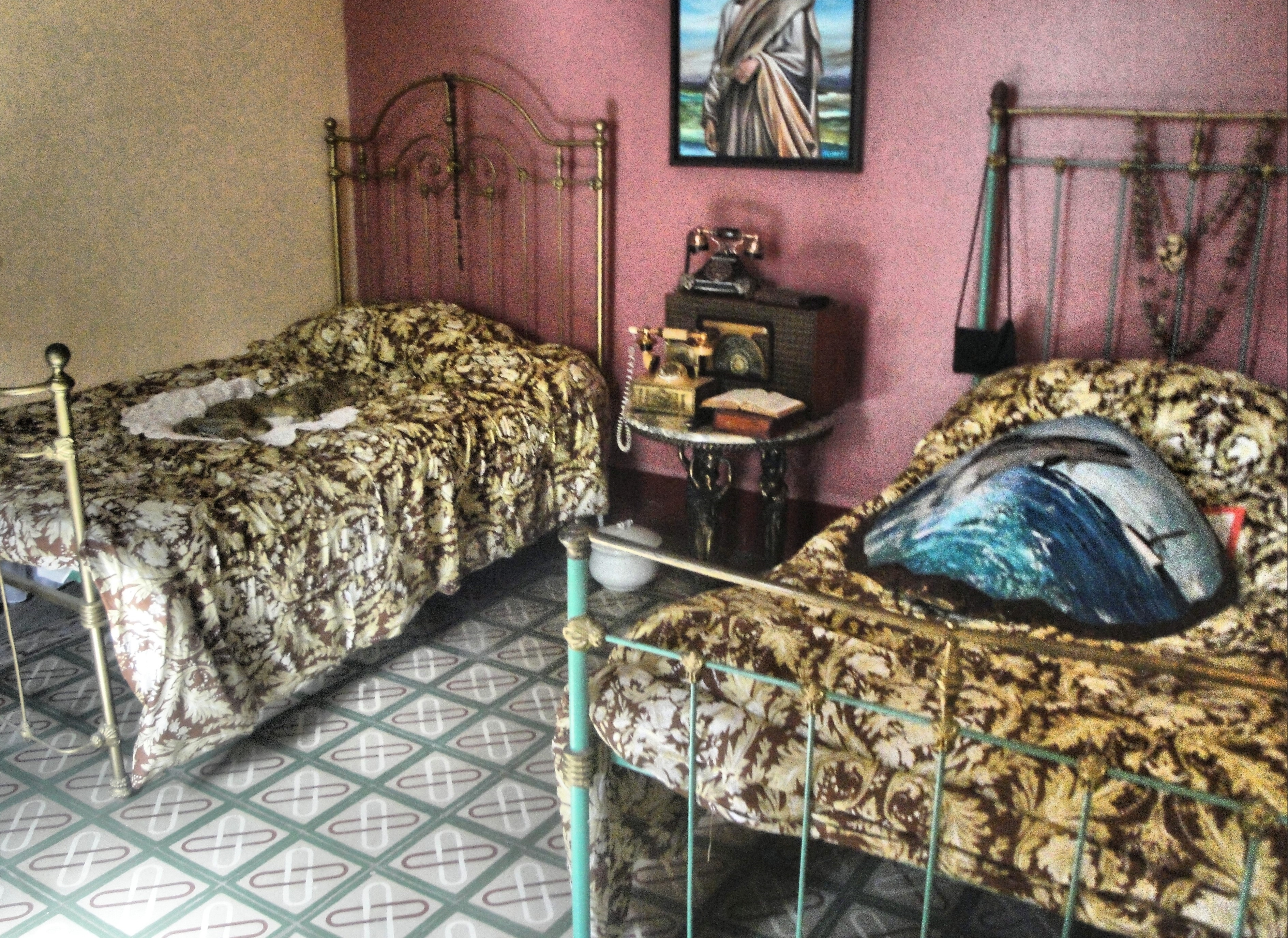 Museo de Antiguedades, Aguada, Puerto Rico